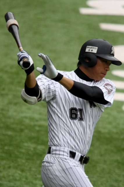 日本プロ野球 千葉ロッテマリーンズ 角中勝也 外野手